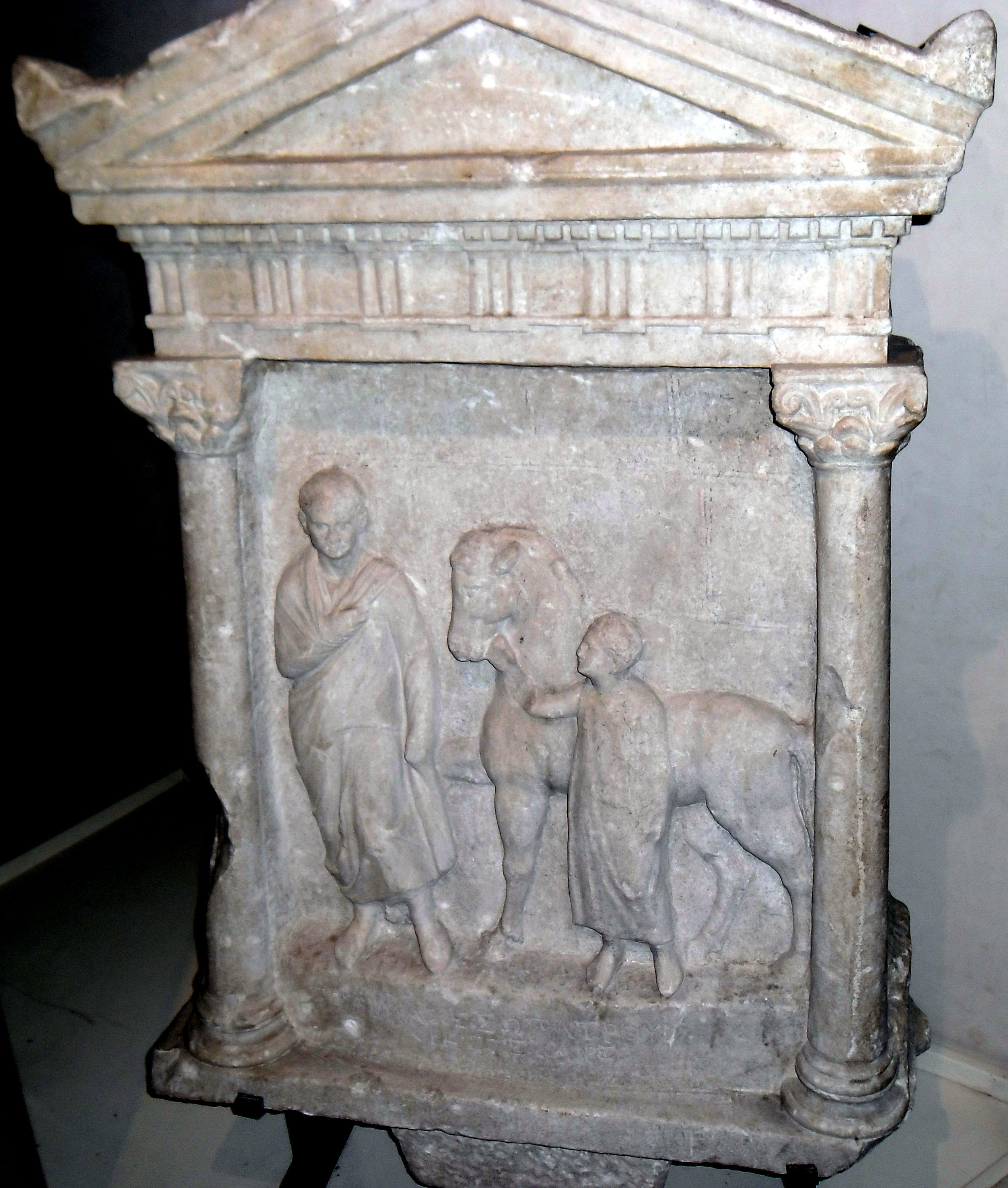 Museo archeologico nazionale delle Marche (Ancona)